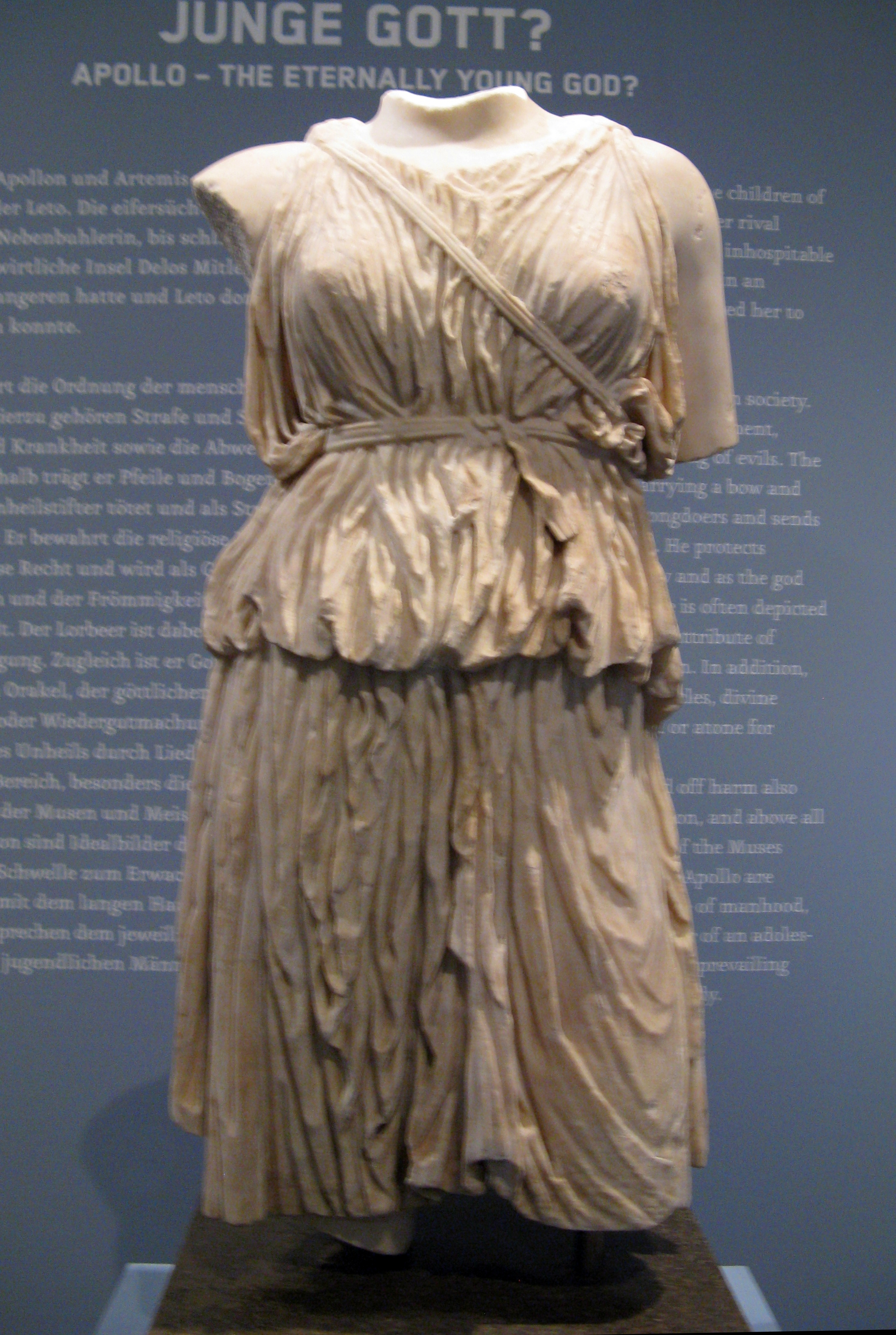 Torso einer Artemis-Statue, geschaffen um die Mitte des 2. Jahrhunderts nach einer Vorlage aus dem späten 4. Jahrhundert v. Chr., 1766 aus der Sammlung Natali in Rom für die Antikensammlung Berlin/Pergamonmuseum erworben, Marmor, Höhe 83cm, Inventarnummer SMB Sk 61